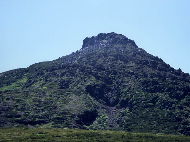 Rausu-dake, desde Rausu-daira. Shiretoko, Hokkaido, Japon. 羅臼平より望む羅臼岳。北海道・知床